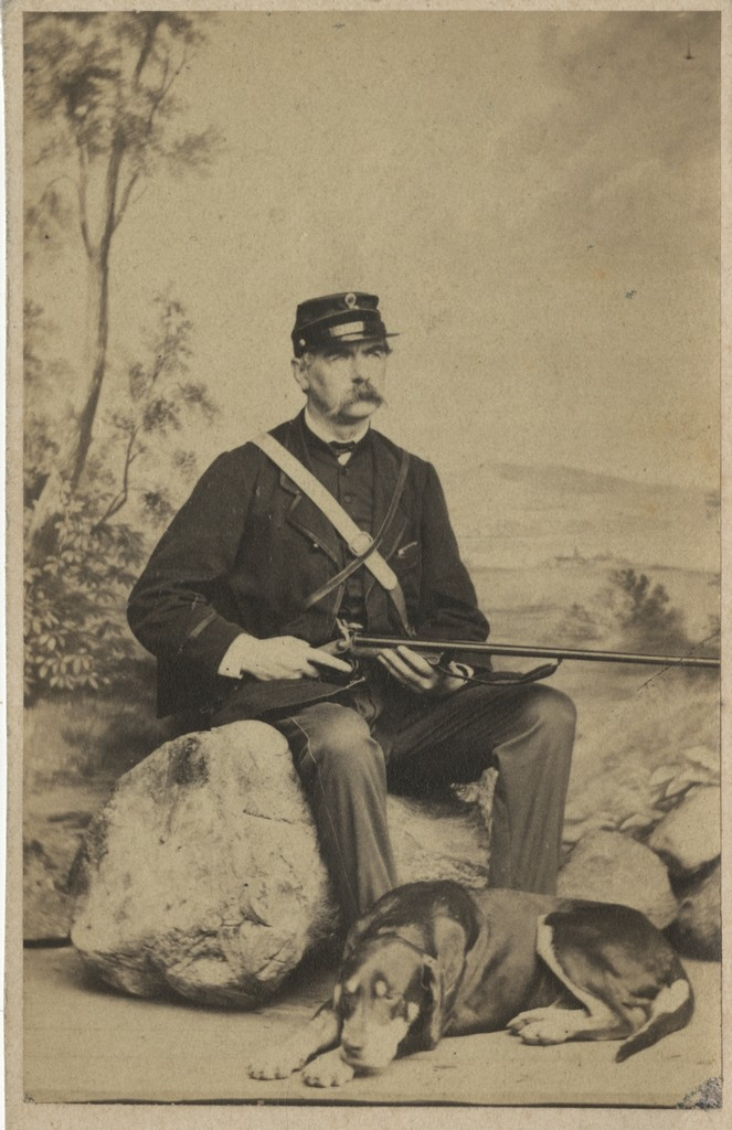 Ernst Christian Ludwig von Wardenburg (* 31. Dezember 1810 in Husum; † 28. Januar 1886 in Arensburg) Autor / Author: C. Höflinger Viitekood / Reference code: EAA.1674.3.1341.1 Kirje andmebaasis FOTIS / Description in the database FOTIS